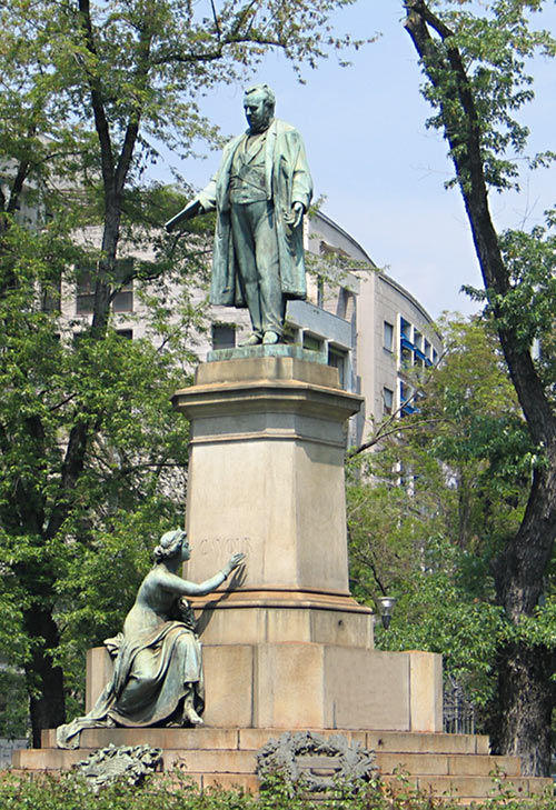 Monument for Camillo Benso Cavour in Milan. Sculptors Odoardo Tabacchi & Antonio Tantardini, 1865.